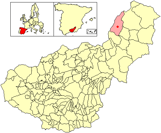 Situación de la localidad de Puentezuela (en el municipio de Castril) respecto a la provincia de Granada, en España.